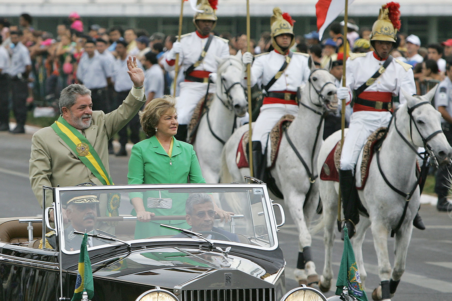 Brasília - Presidente Lula e dona Marisa saúdam populares na abertura do desfile cívico-militar em comemoração ao Dia da Pátria. Foto: Ricardo Stuckert/PR.